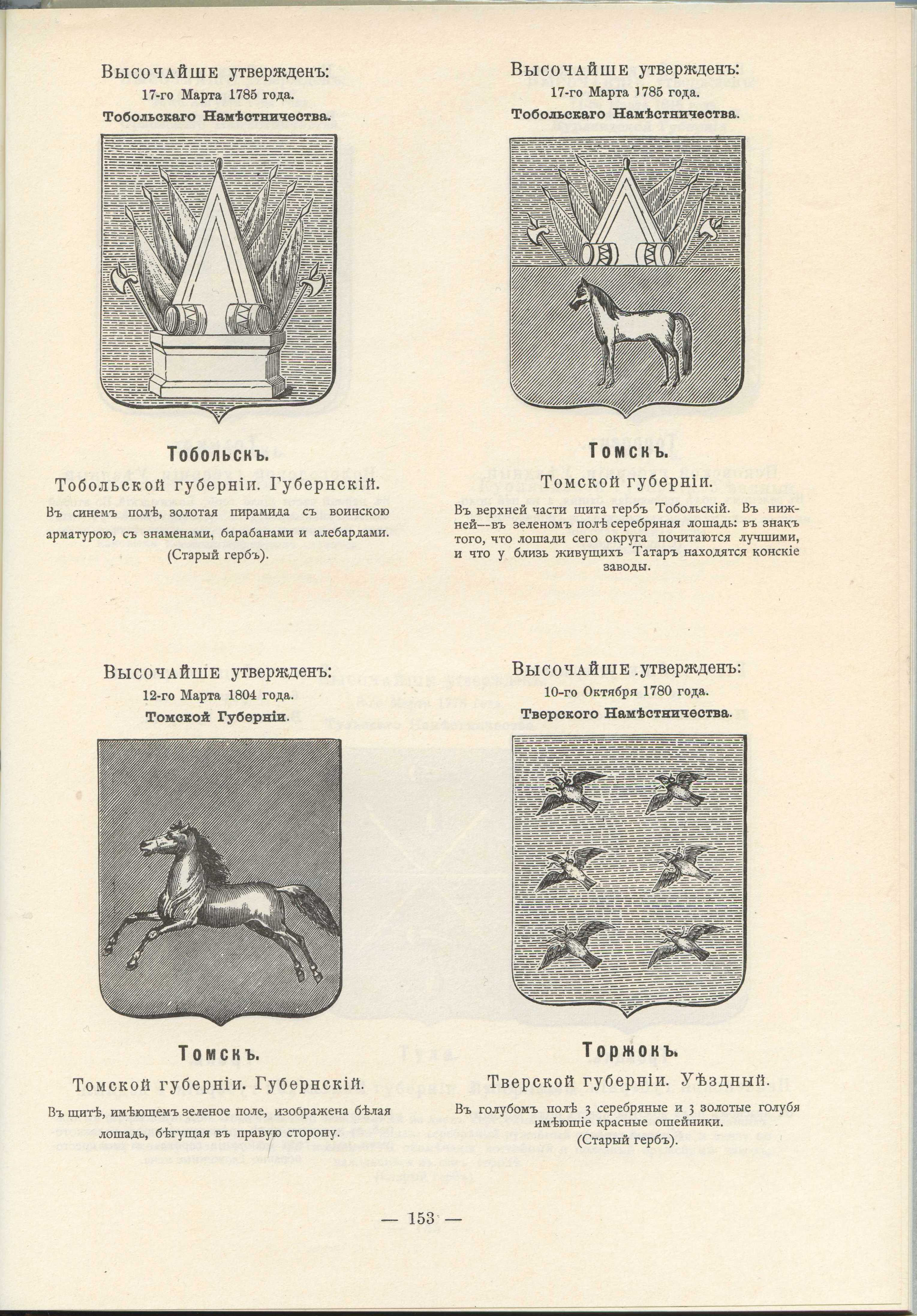 Official Russian Empire coats of arms. Гербы городов Российской Империи Тобольск, Томск, Торжок - с официальным описанием в Гербовнике Винклера.